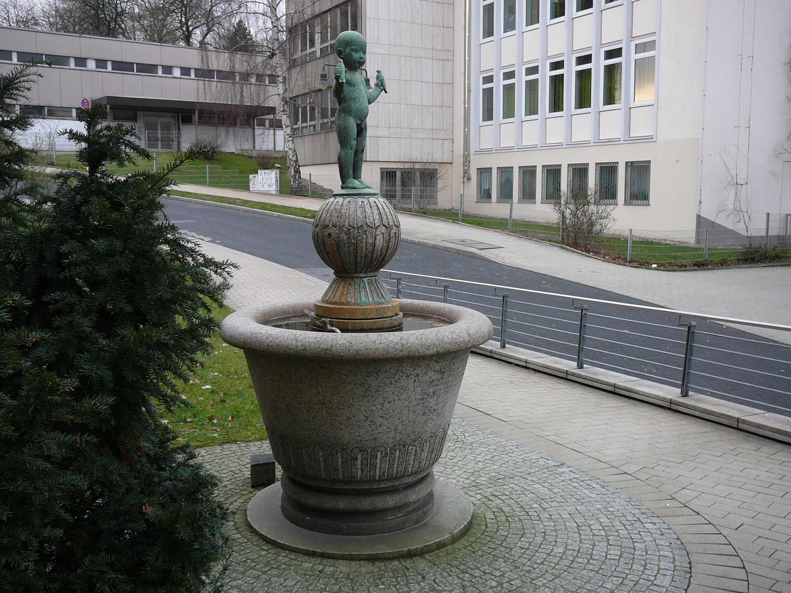 Johannisberg, Wuppertal